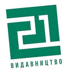 Логотип "Видавництва 21"